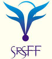 Identitatea vizuală a Societății Române de SF&F